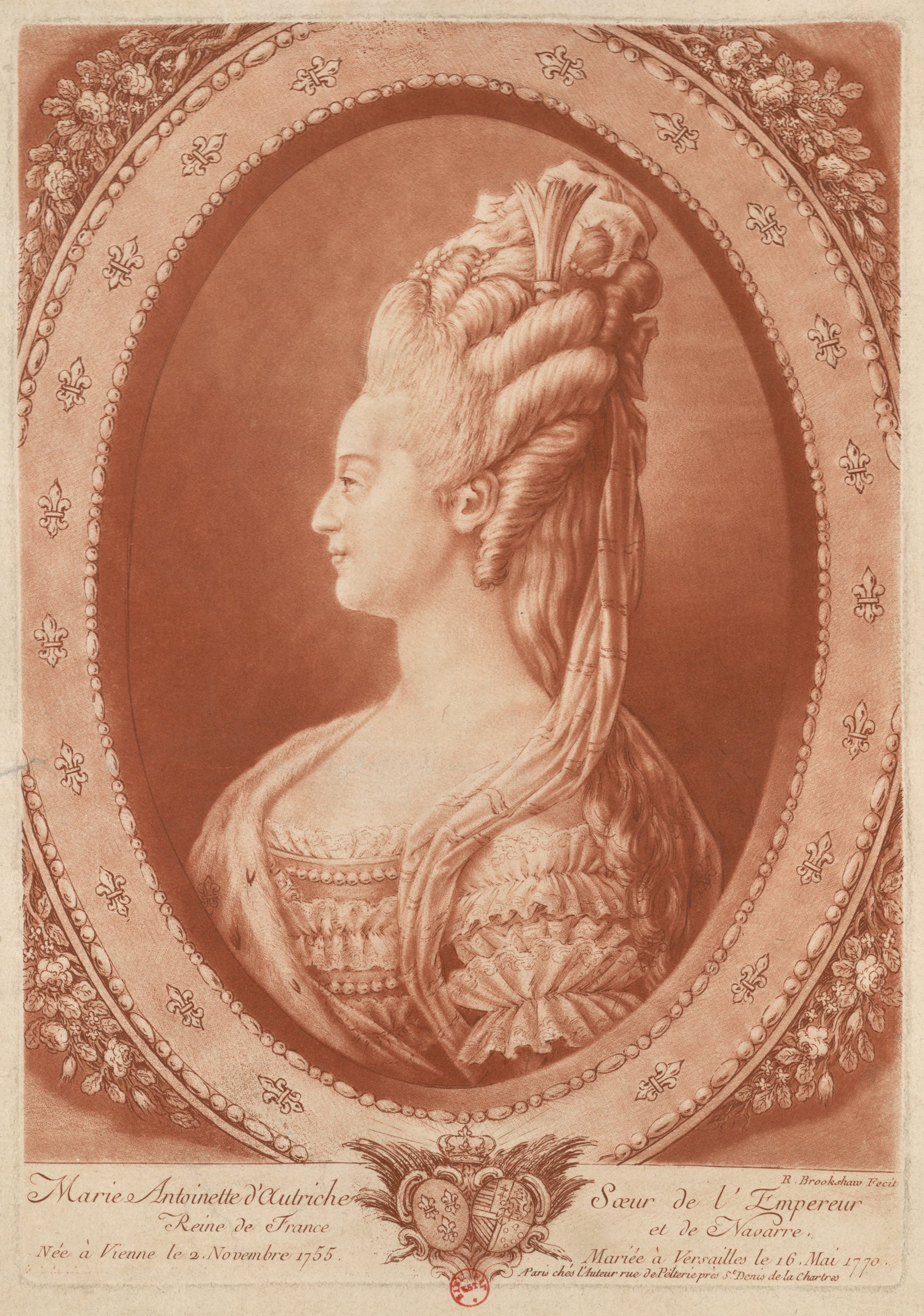 Portrait of Marie Antoinette (1755-1793)